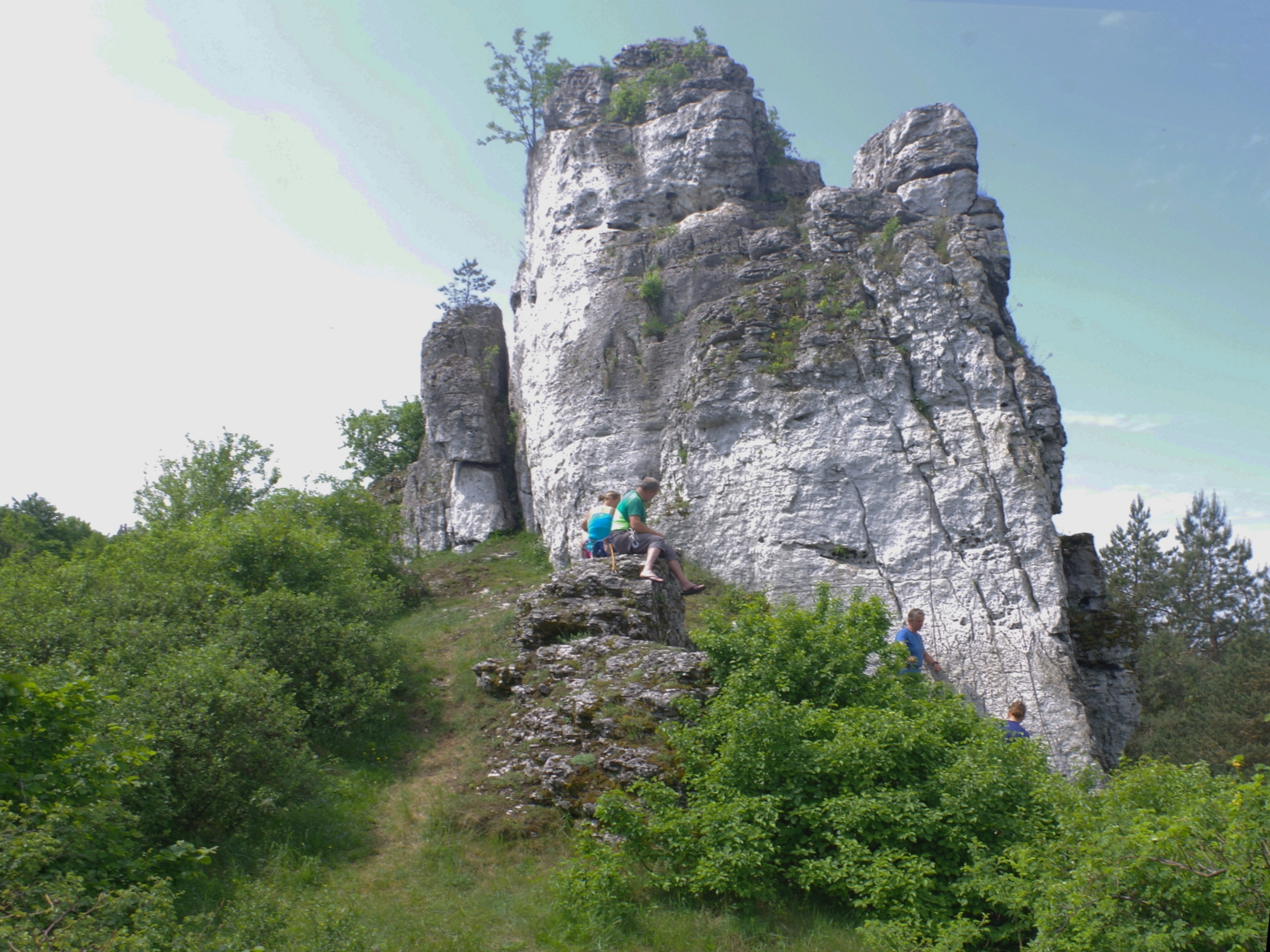 Skała Weselna w Straszykowych Skałach w Ryczowie